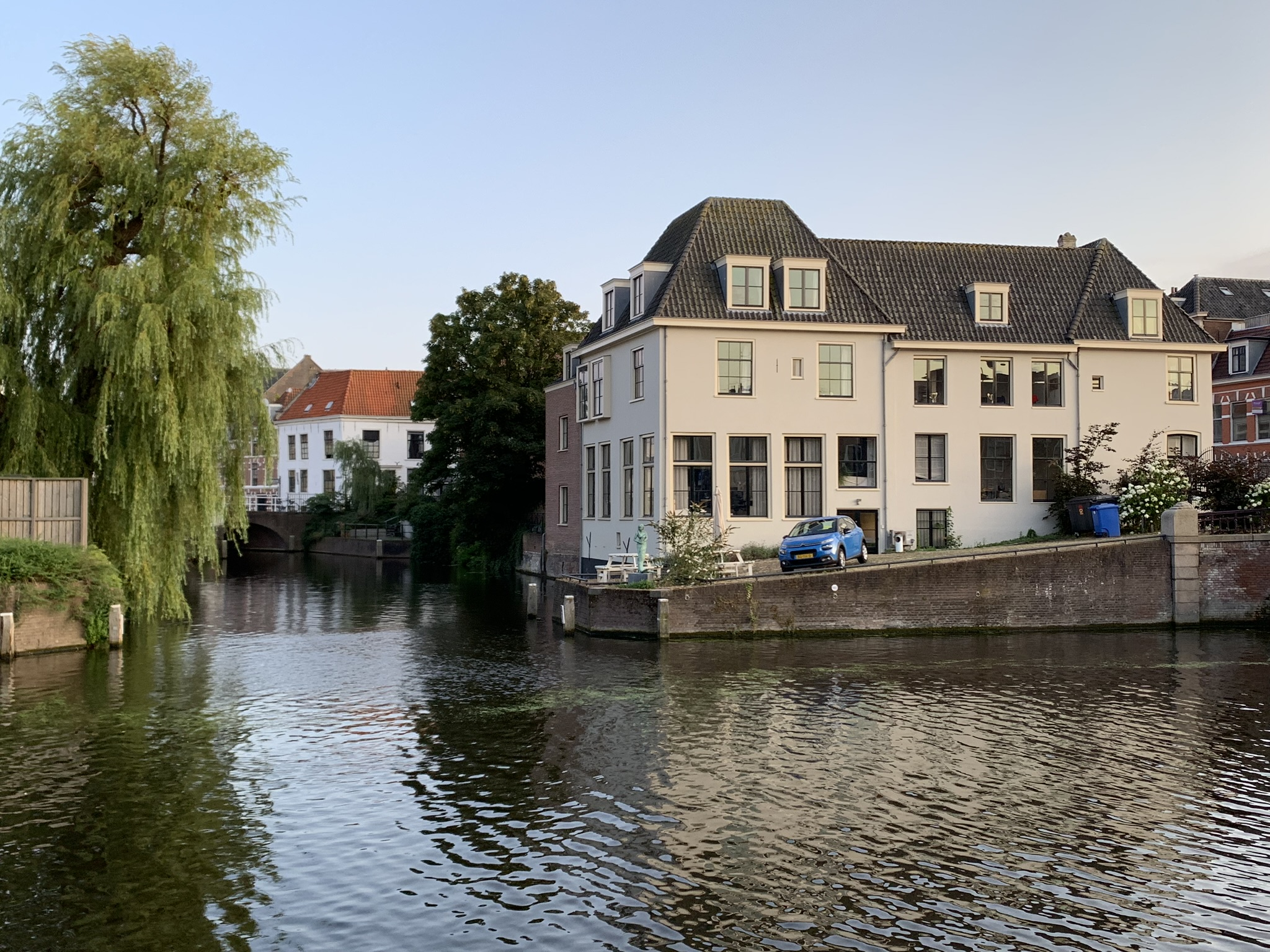 Het Paardenwed in Haarlem anno 2019